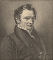 Portrait de J. Récamier Héliographie Dujardin (d'après Paul Triaire)